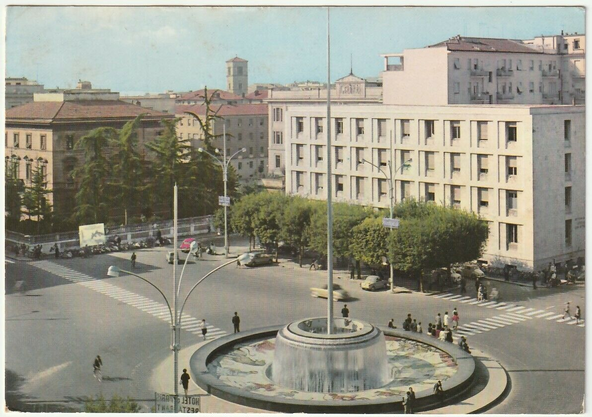 Fontana dello Zodiaco, 1936, a Terni, piazza Tacito